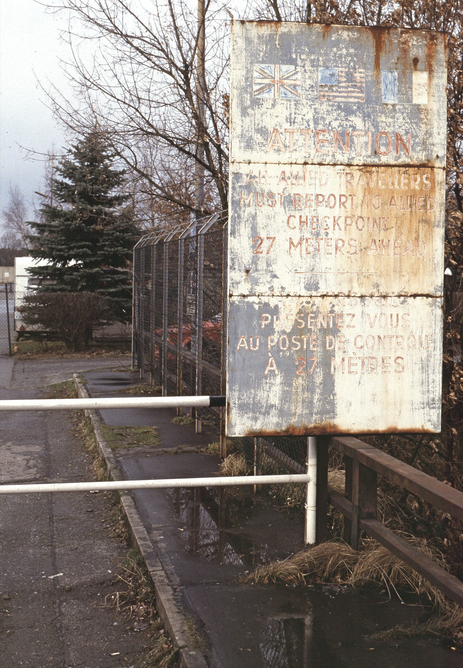 Hinweisschild Grenzübergang Albrechts Teerofen Berlin